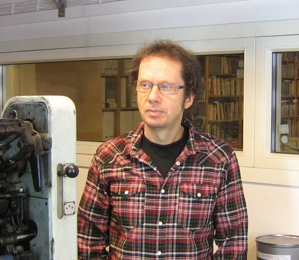 Dekius Lack i Bakhålls tryckeri 2015.